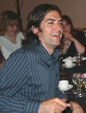 Drew Goddard & Jenny Mollen